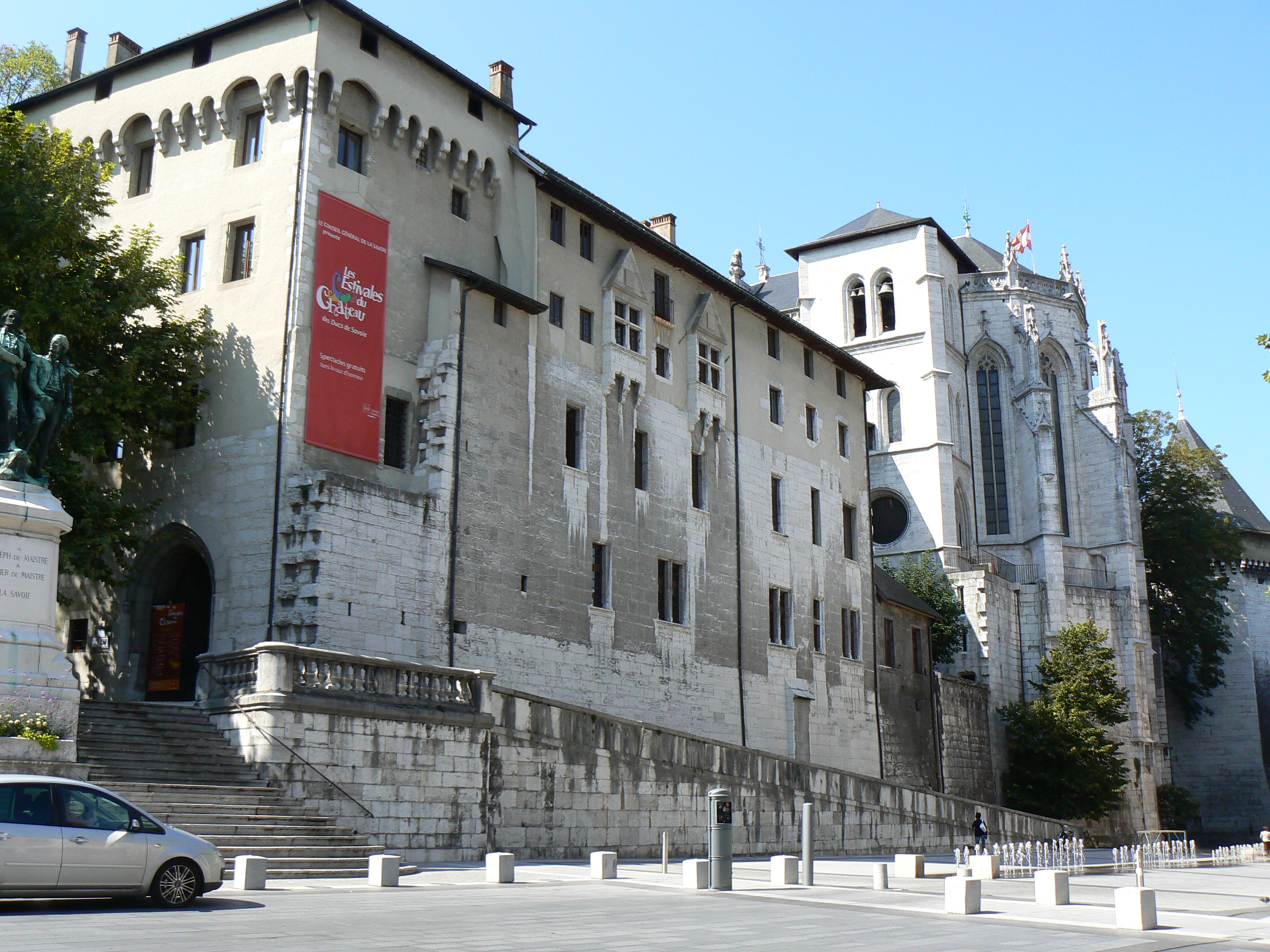 Palác savojských vévodů - Chambéry